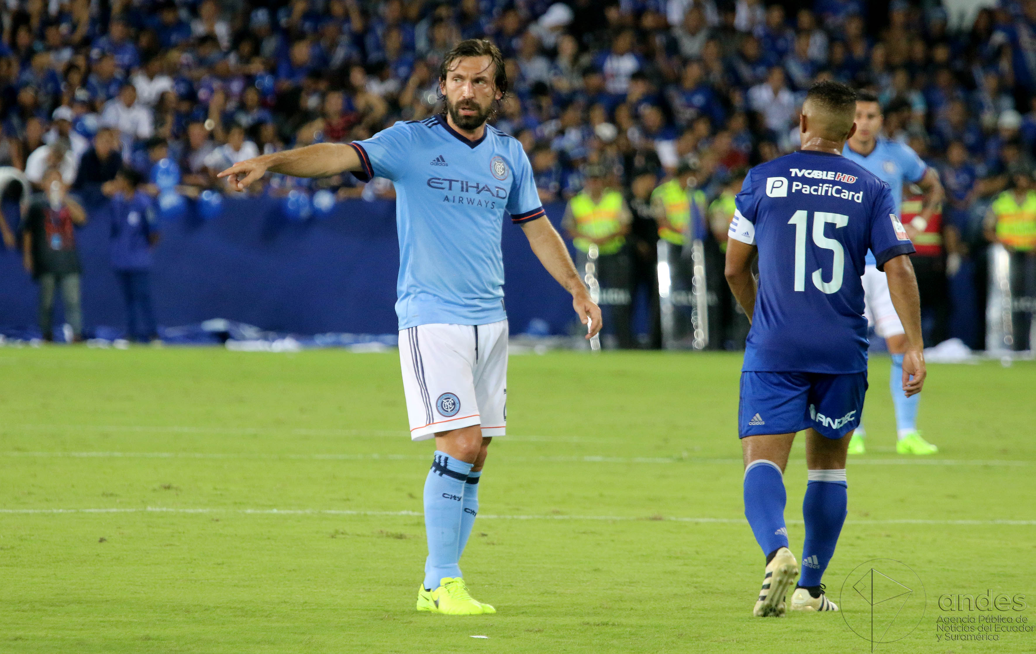 Guayaquil, miércoles 08 de febrero del 2017 (Andes).-Emelec enfrenta al New York City en la reinaguración del estadio Capwell Foto:Andes/César Muñoz